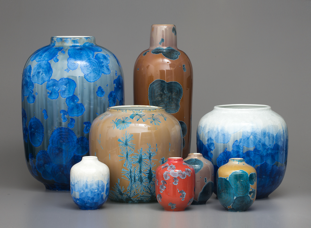 Krystalické vázy, Milan Pekař